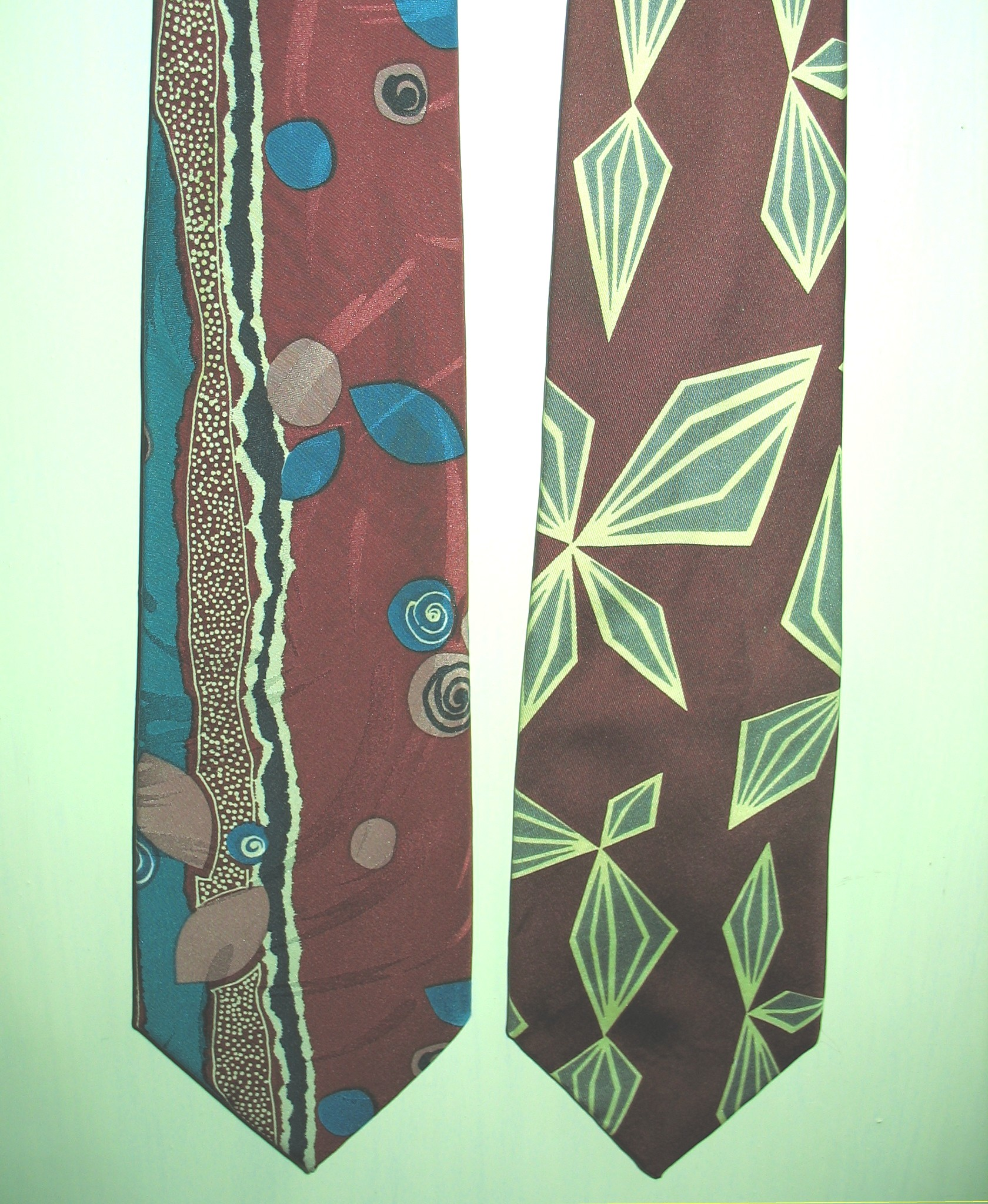 Krawatten